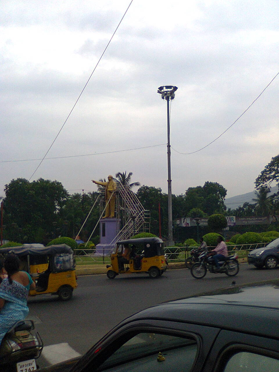 డాబా గార్డెన్స్